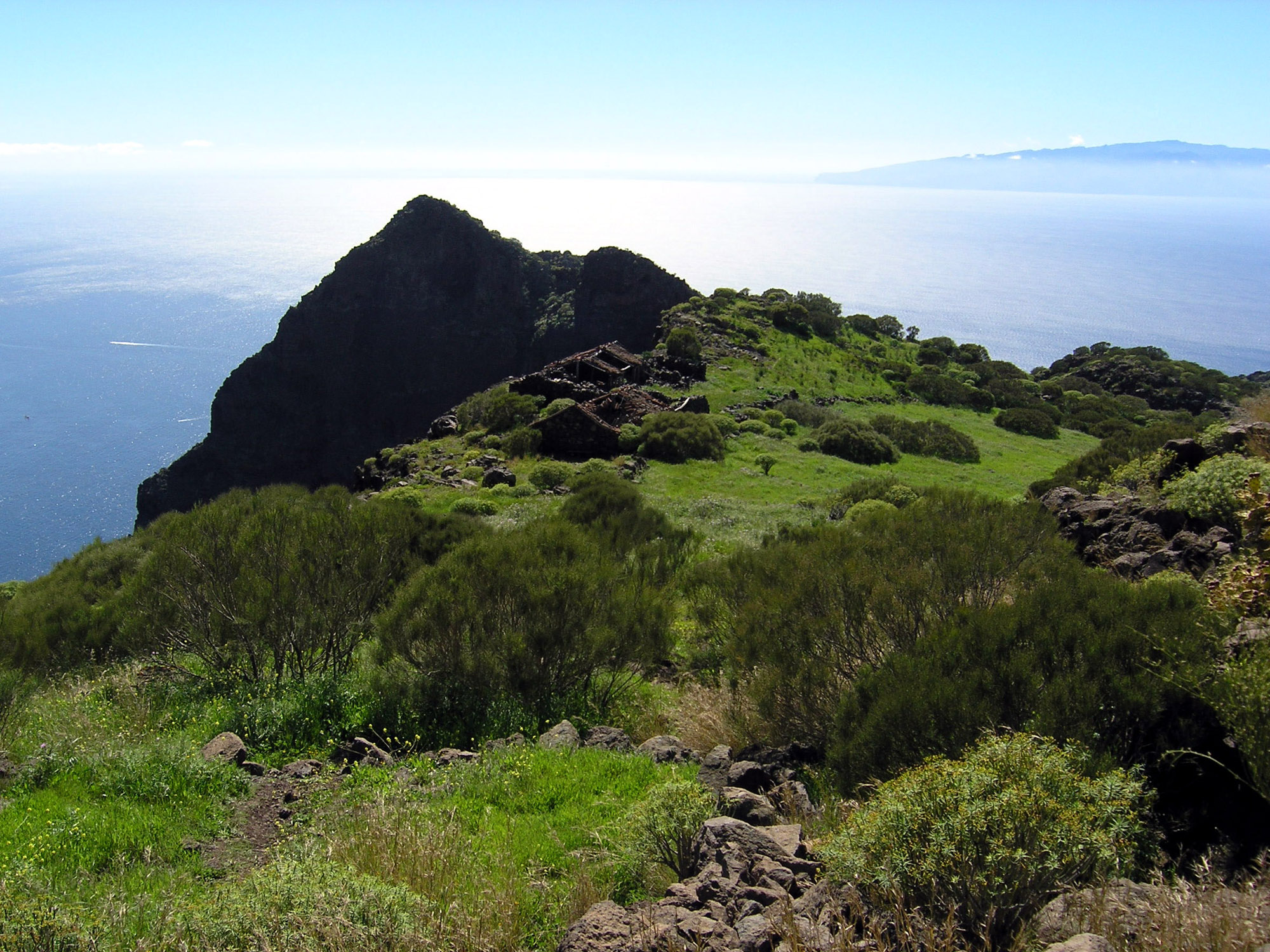 Finca de Guergues, near Masca, Tenerife